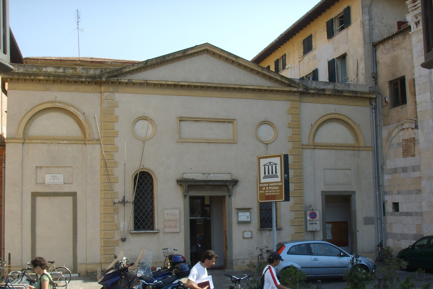 Museo di san Matteo, entrata